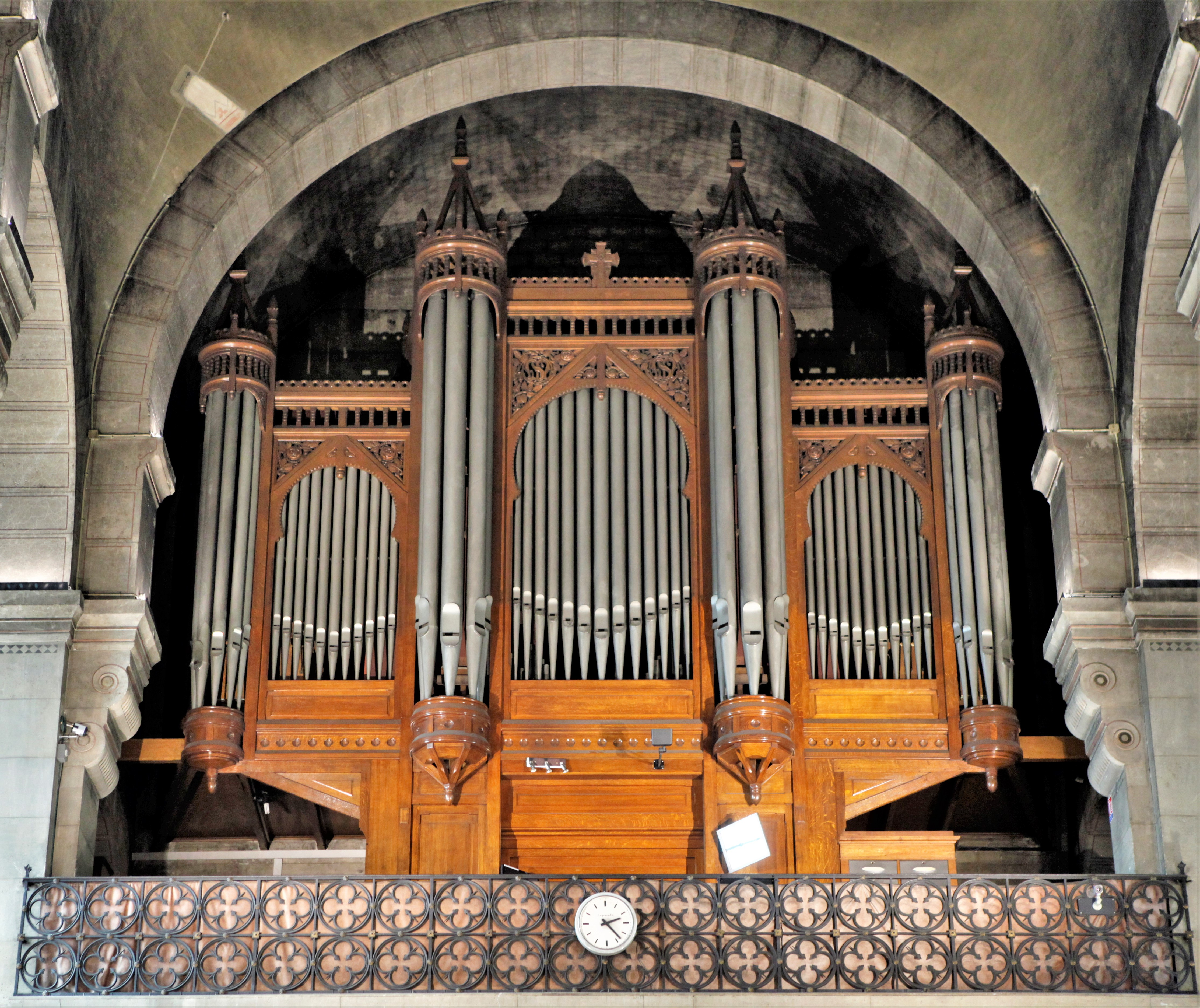 Eglise Notre Dame d'Auteuil